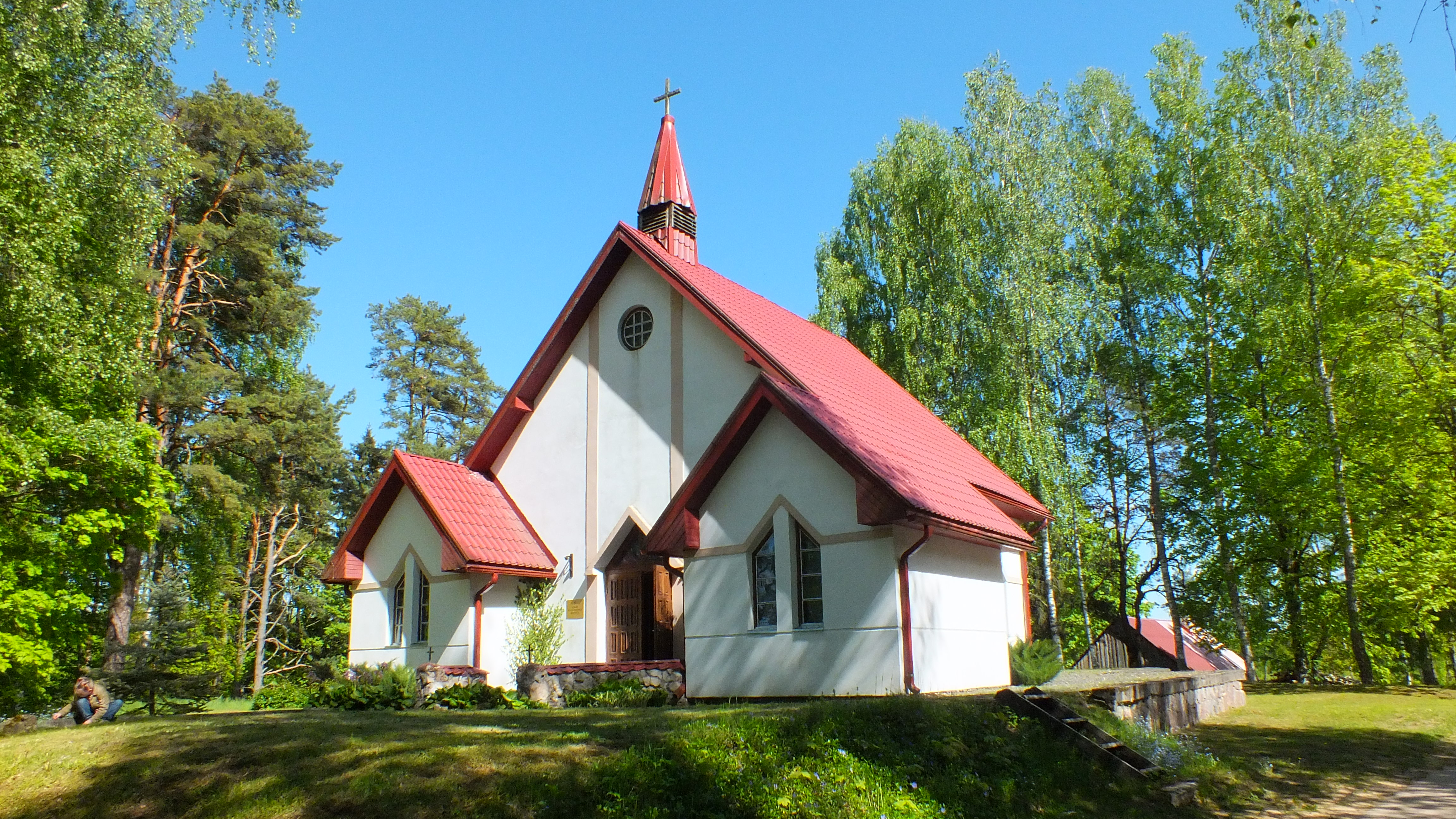 Tomes baznīca (2)